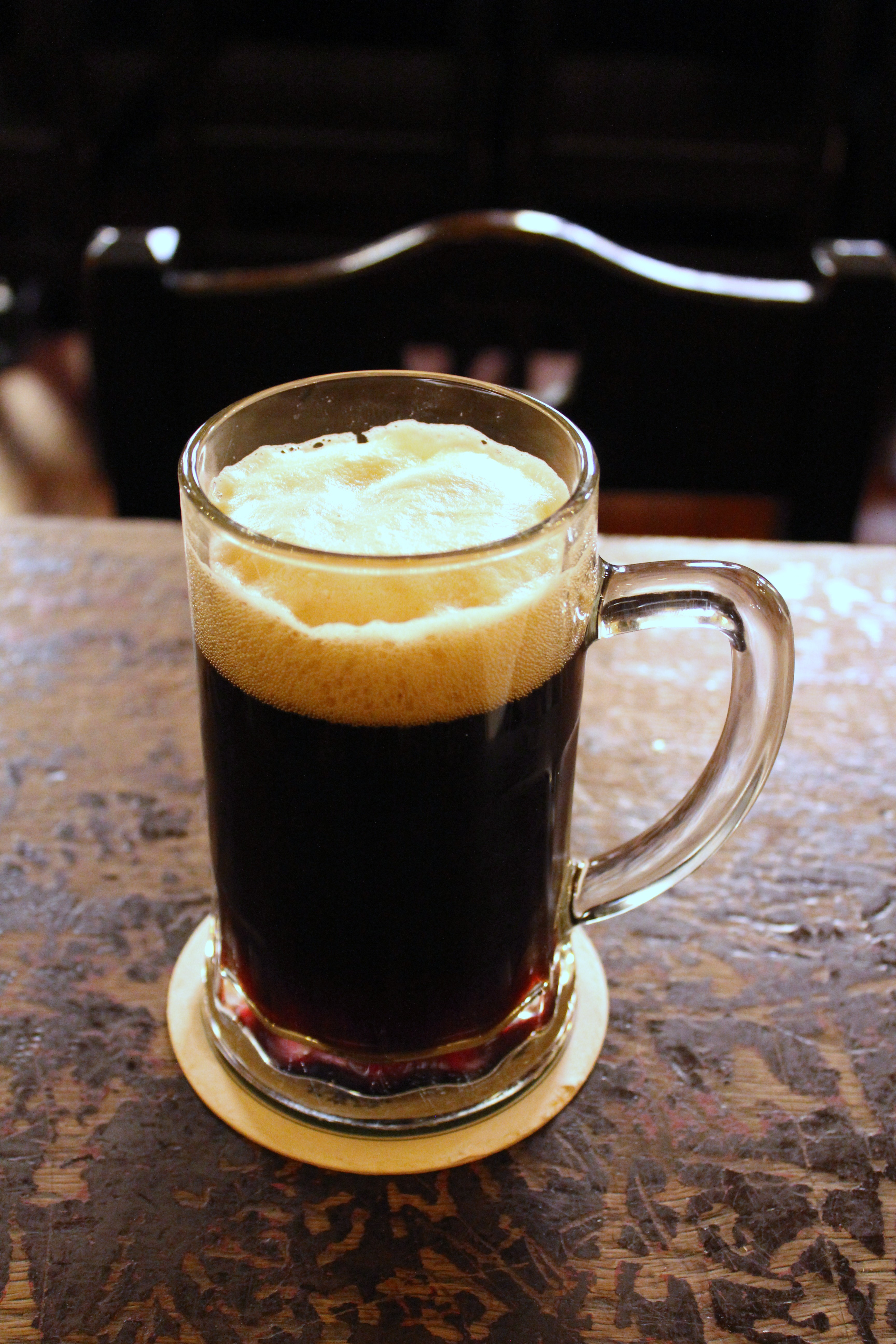 U Fleku Nove Mesto Beer Hall ølhall Glass of dark beer